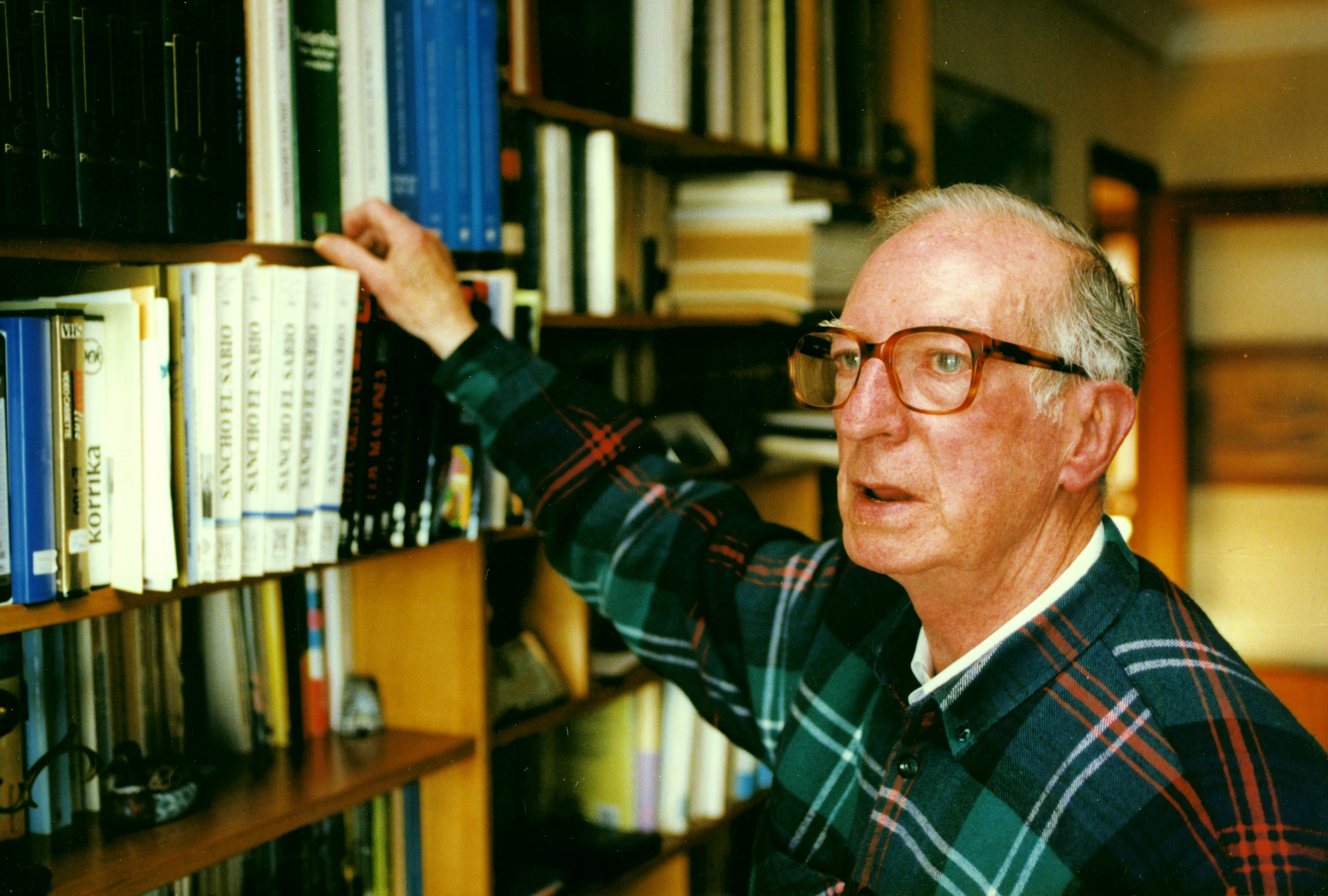 Aiurri 34 zbk. 14. orr.